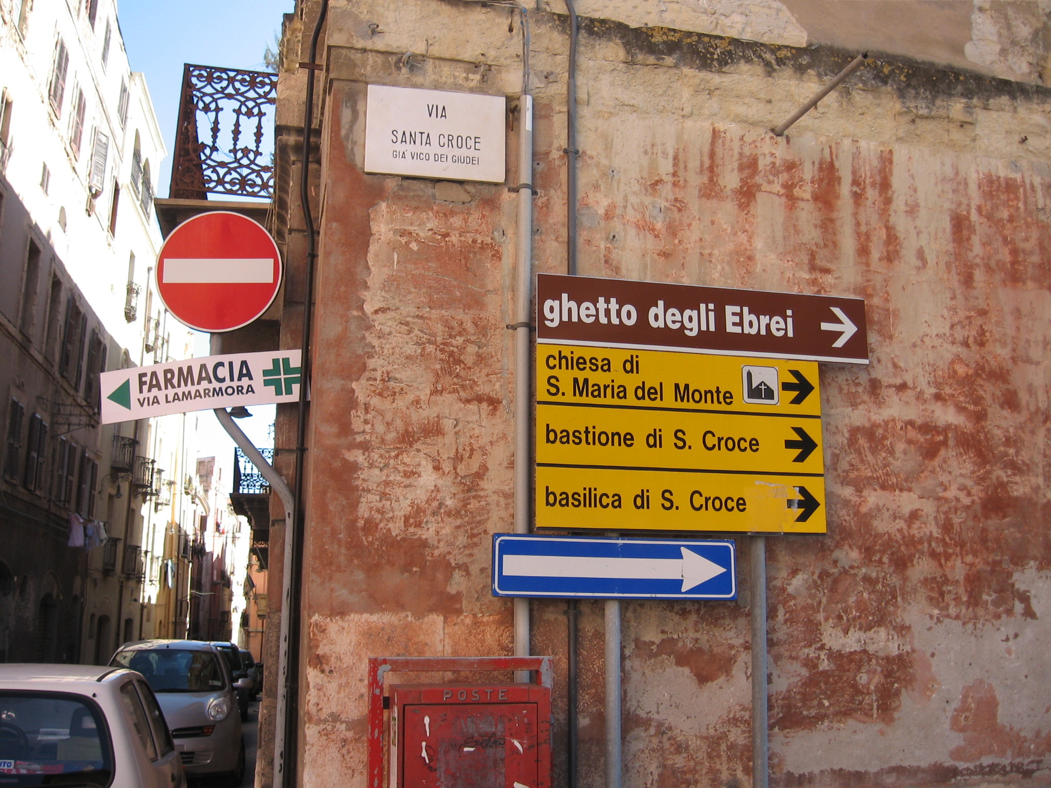 ghetto degli ebrei a Cagliari